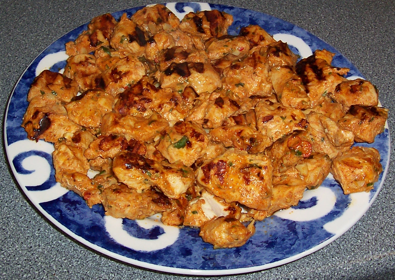 Cooked Chicken Tikka